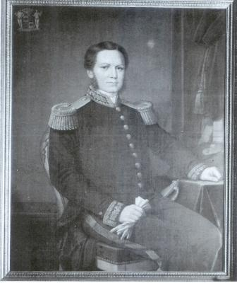 portrait du baron Jacques van de Werve et de Schilde